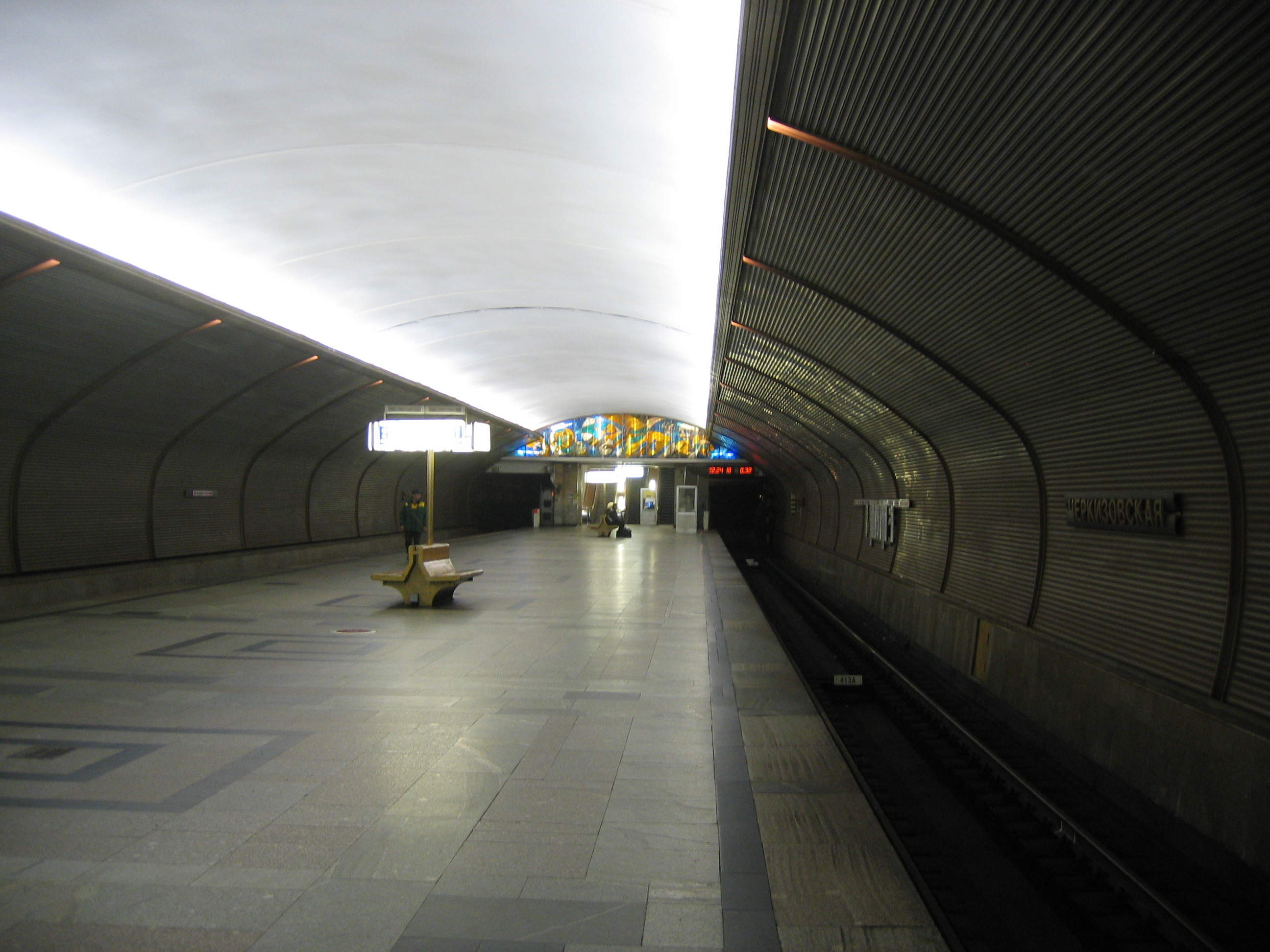 Station Tscherkisowskaja der Metro Moskau